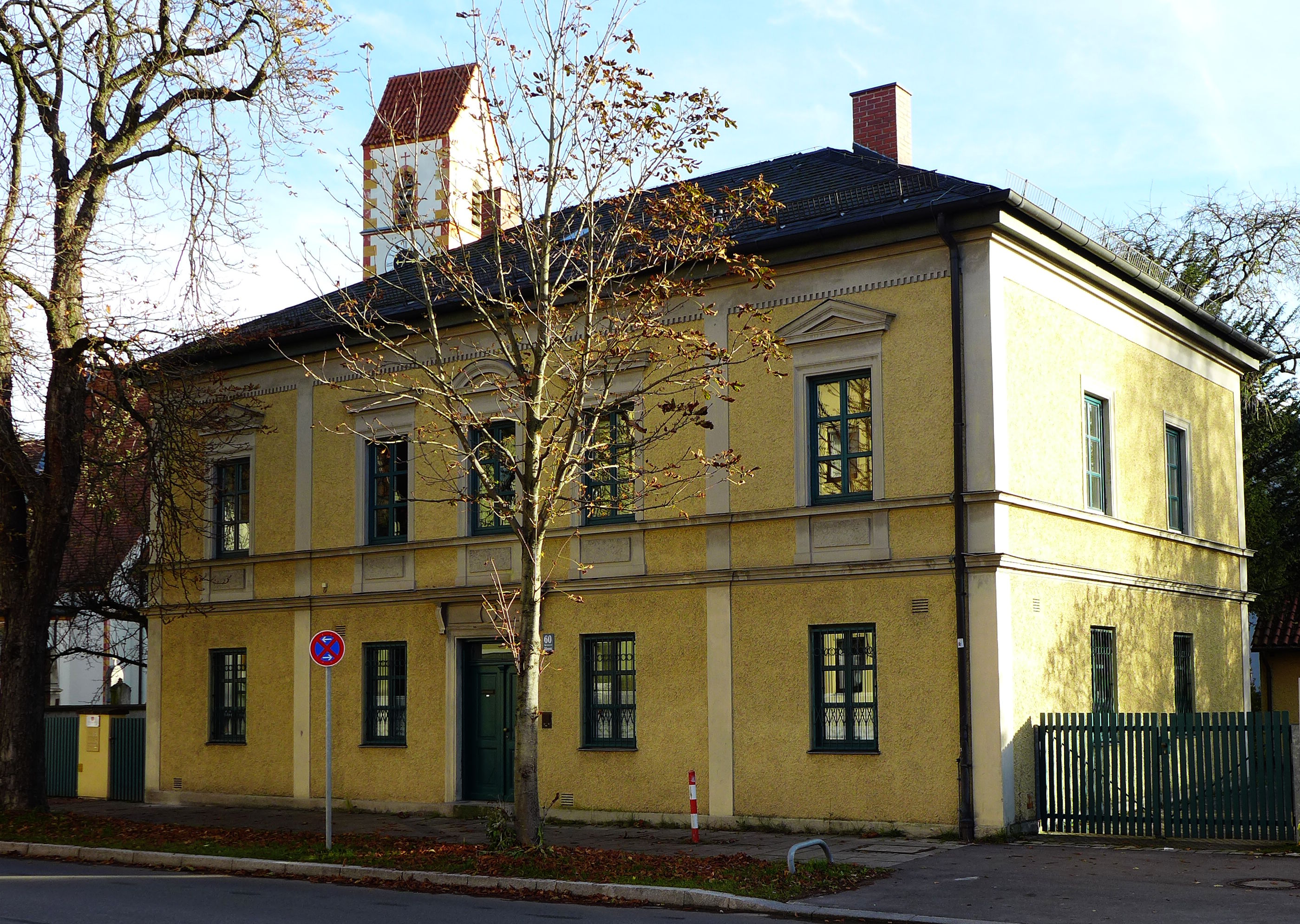 Pelkovenstr 60, München